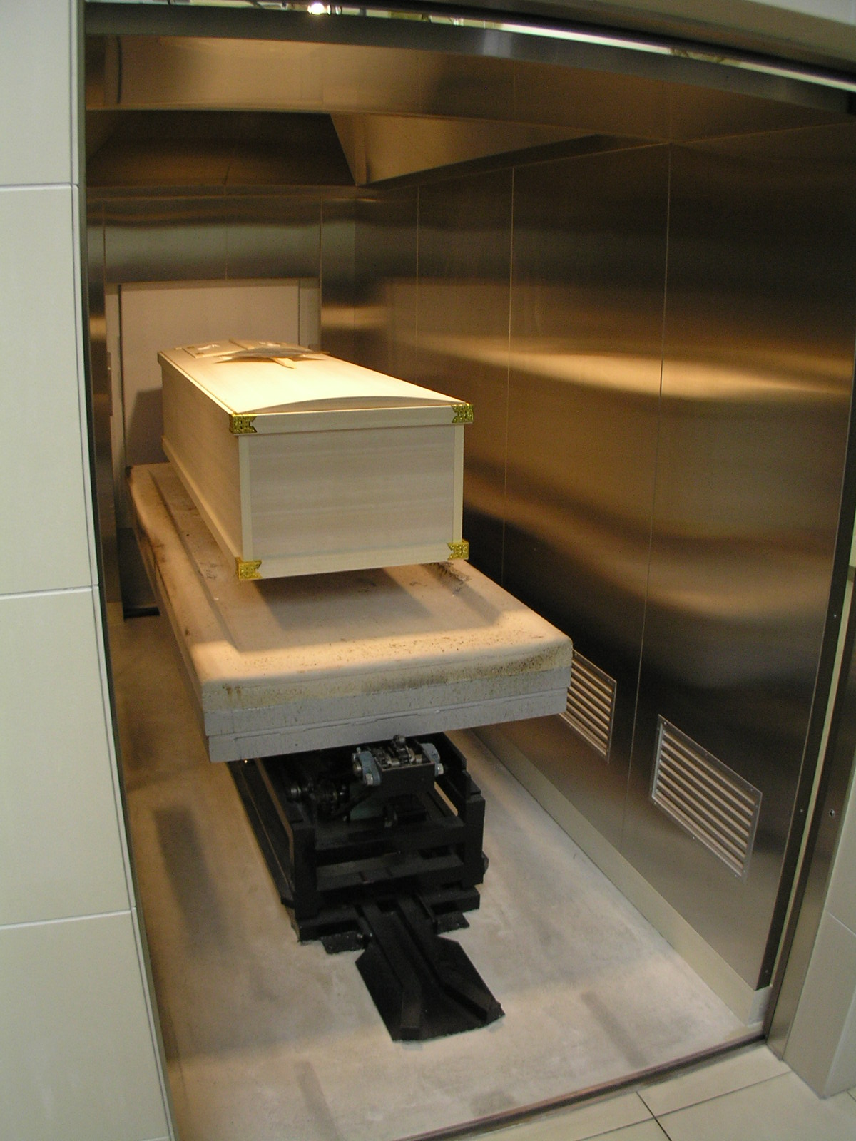 台車式火葬炉 ～photo by Autumn Snake 【おぉたむ すねィく探検隊】